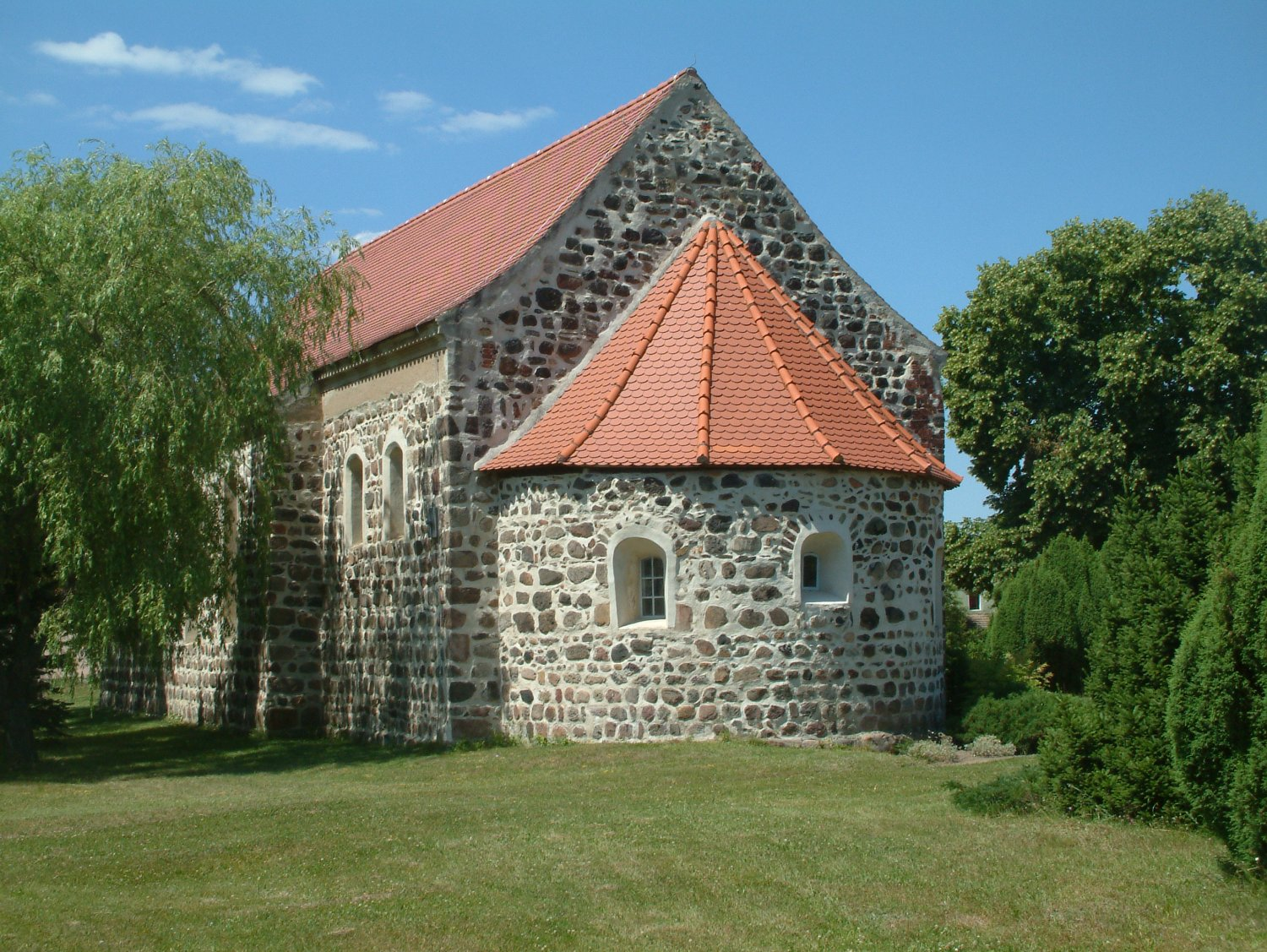 Church in Jeserig/Fläming, Germany, Feldsteinkirche in Jeserig/Fläming, Brandenburg